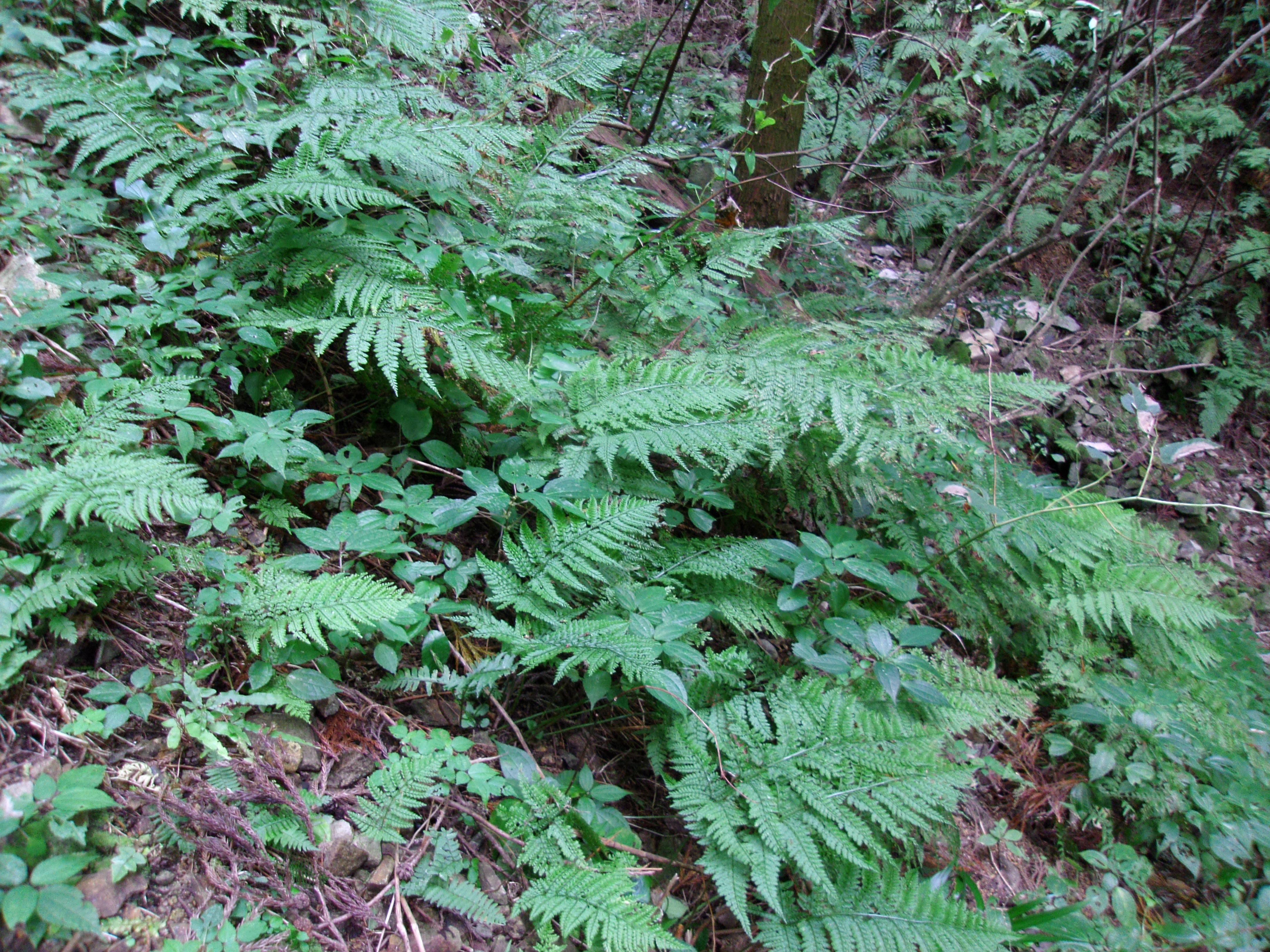 世界遺産「石見銀山」の構成資産である銀山街道温泉津沖泊道 鉱床岩盤の隙間に根を張るヘビノネコザ